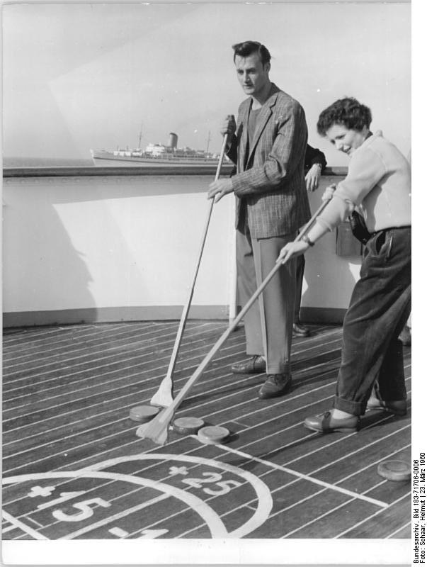 Zentralbild Schaar-23.3.1960 Erste Fahrt des FDGB-Urlauberschiffes "Völkerfreundschaft". Ende Februar 1960 startete das erste FDGB-Urlauberschiffe "Völkerfreundschaft" zu einer 27tägigen Ferienreise von Rostock aus ins Mittel- und Schwarze Meer. UBz: Die Handweberin Christa Holz aus Wittenberge und der Fleischer Peter Fisch vom VEB Großberliner Vieh- und Schlachthöfe beim Scheffelbord-Spiel.